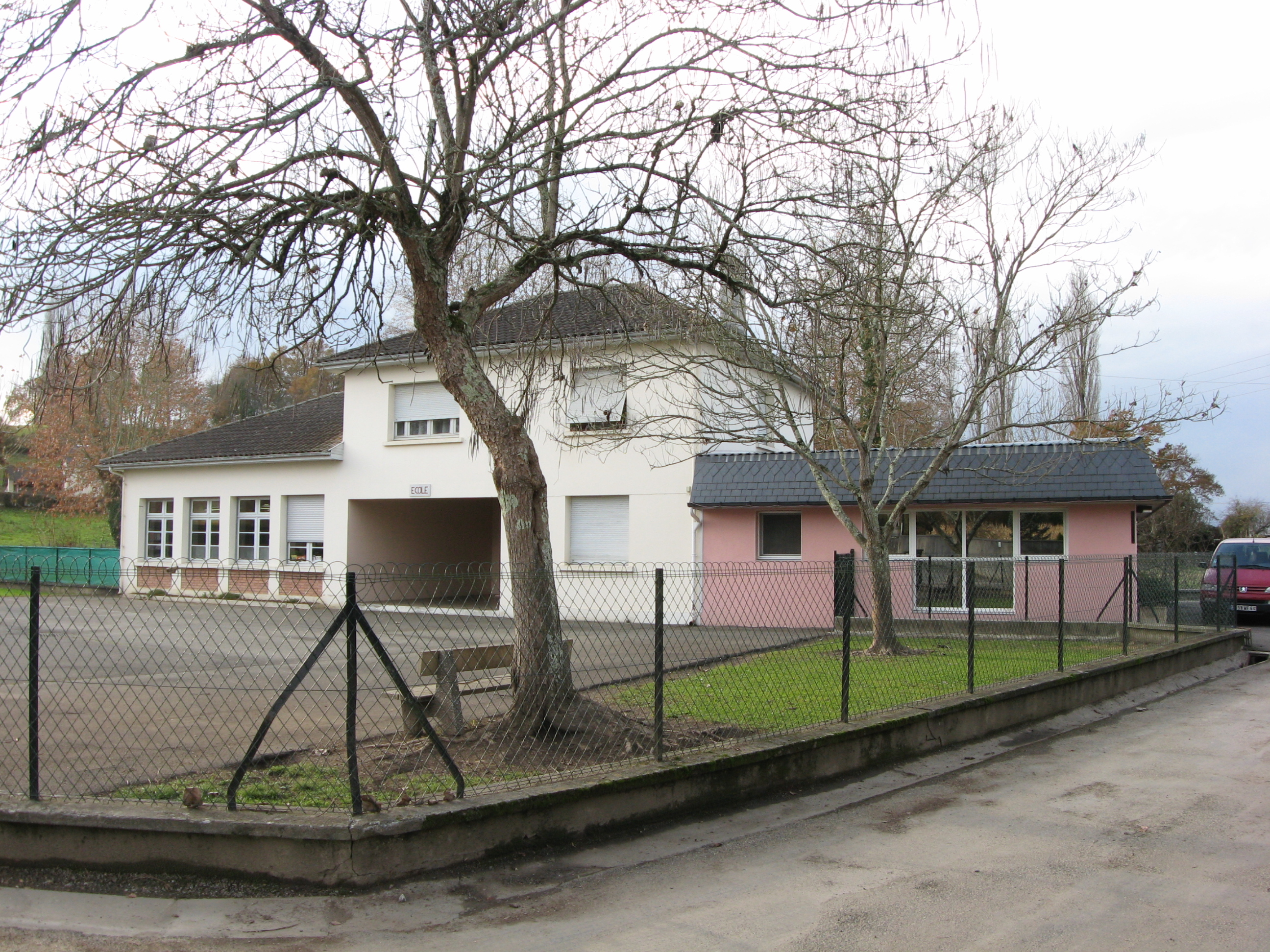 Mairie jouxtant l'école d'Orin (Pyrénées-Atlantiques) (Pyrénées).